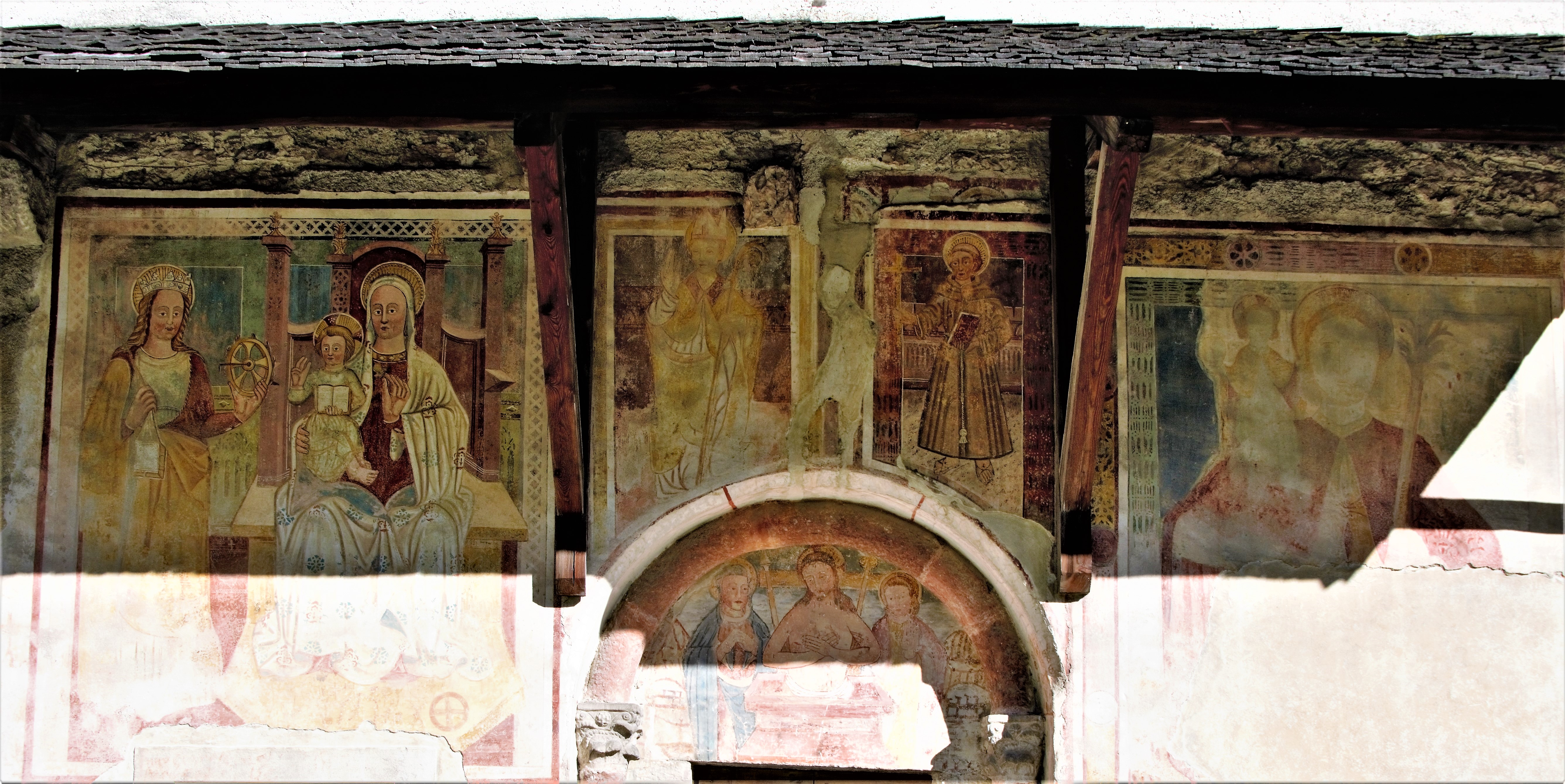 chiesa di San Vigilio; gli affreschi del 17° secolo sono attribuiti alla scuola del Baschenis. This is a photo of a monument which is part of cultural heritage of Italy.